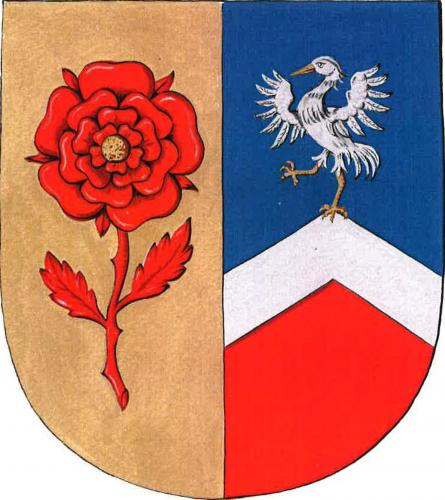 Dešov znak